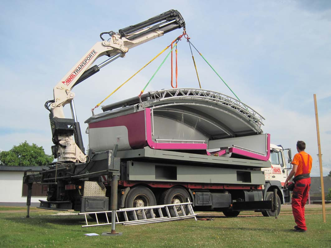 Aufbau des Bühnencontainers mittels Krantechnik